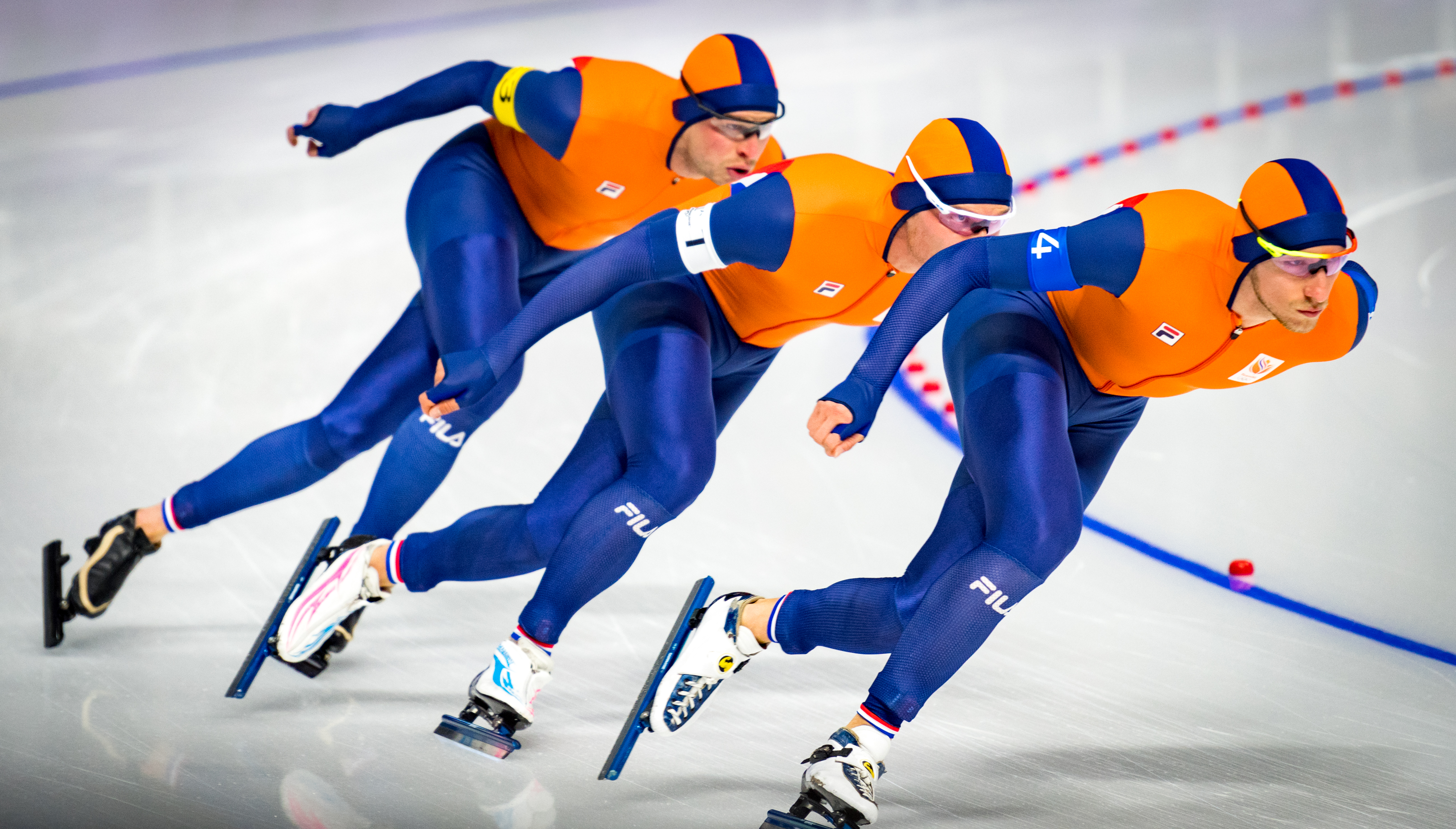 _DSC5156